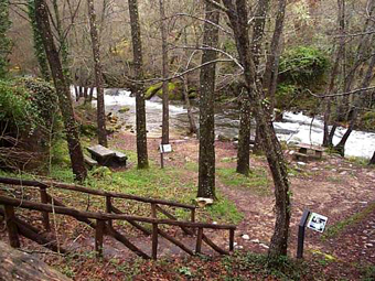 Merendero Casas del Conde